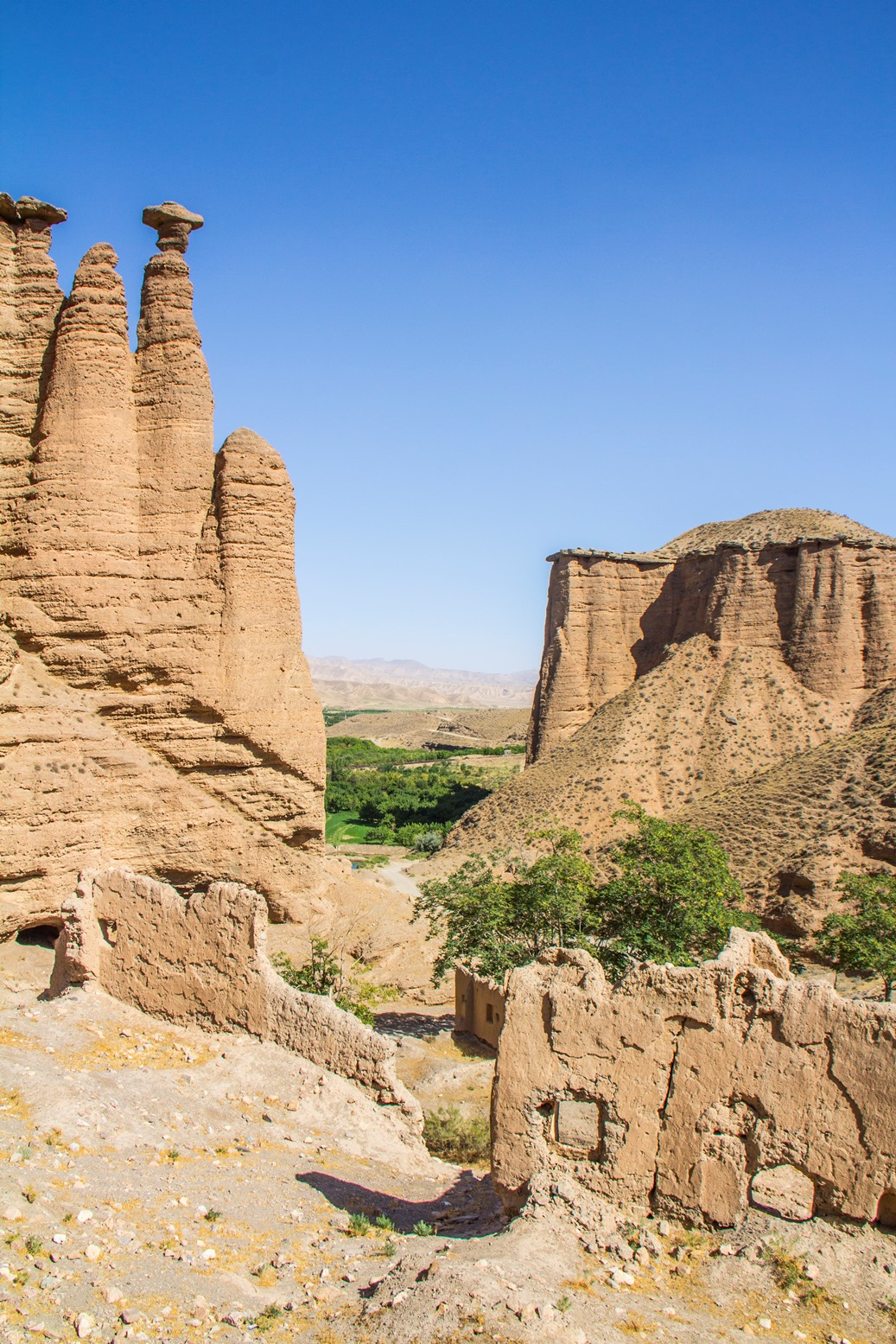 قلعه باستانی بهستان